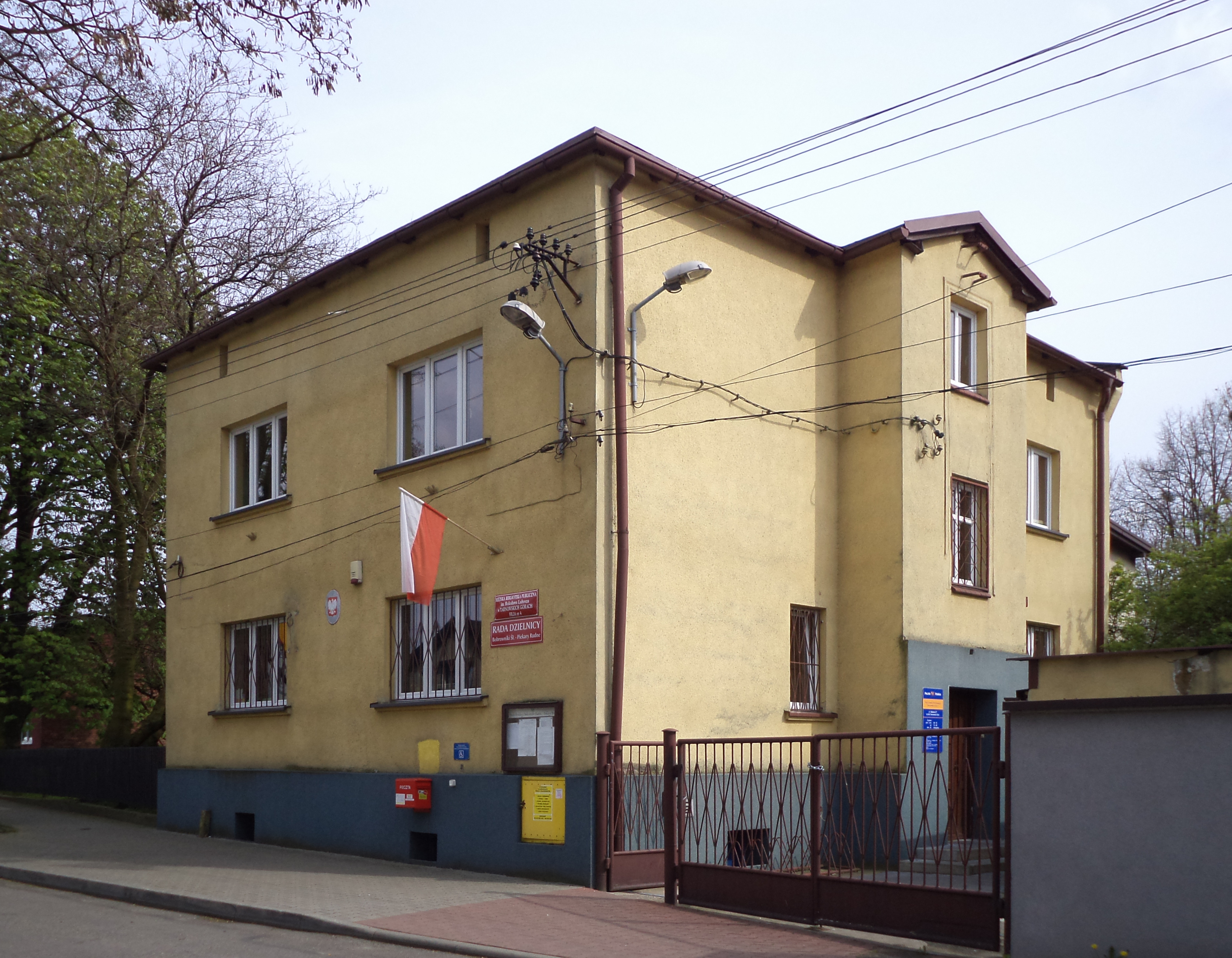 Dawny budynek urzędu gminy Bobrowniki Śląskie. Obecnie Filia nr 5 Miejskiej Biblioteki Publicznej im. Bolesława Lubosza w Tarnowskich Górach oraz siedziba Rady Dzielnicy Bobrowniki Śląskie-Piekary Rudne